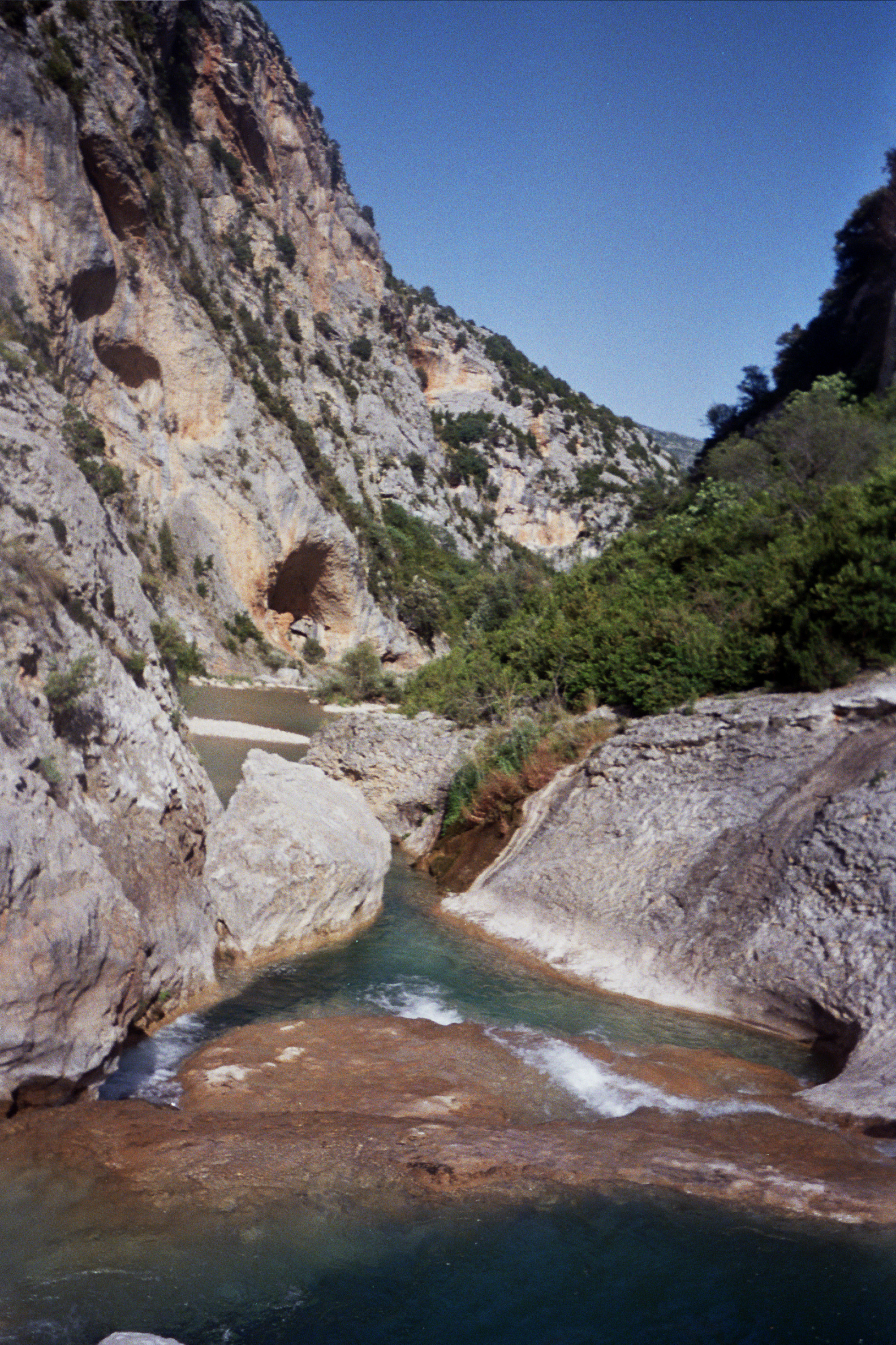 Barranco en la Sierra de Guara